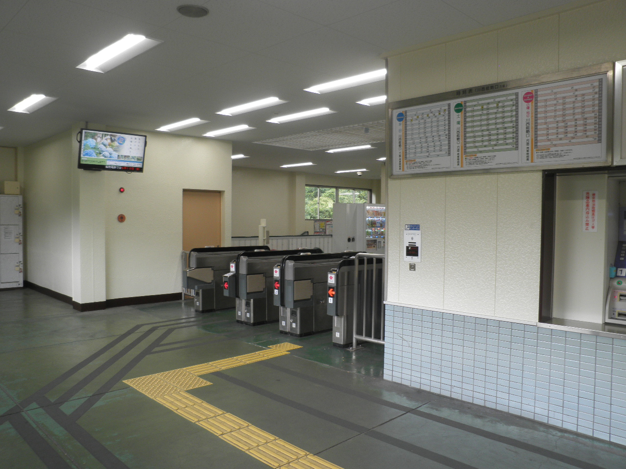 改札口（改札外から撮影）